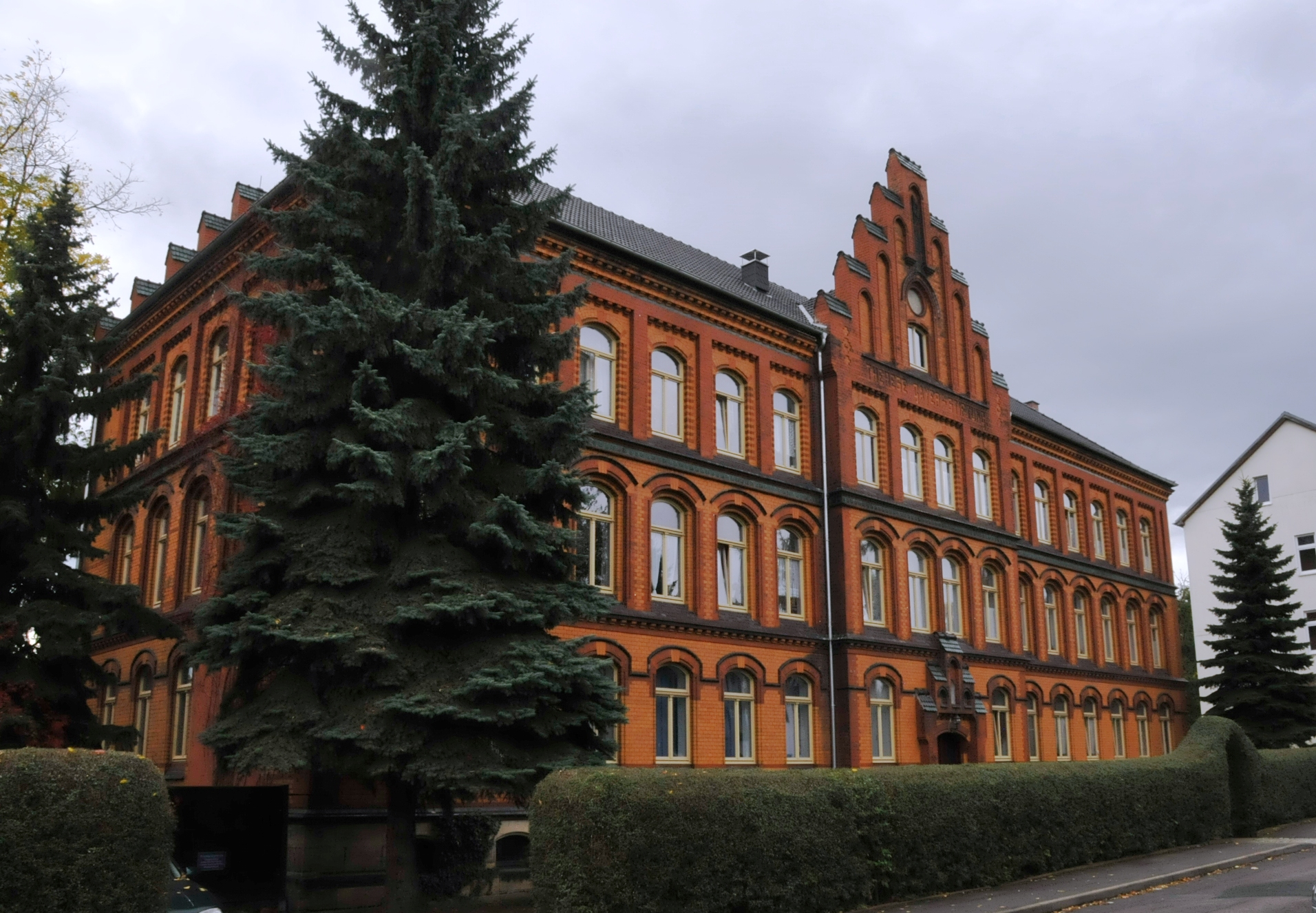 Gotha, Schützenallee 10, Theres-Geyer-Stiftung